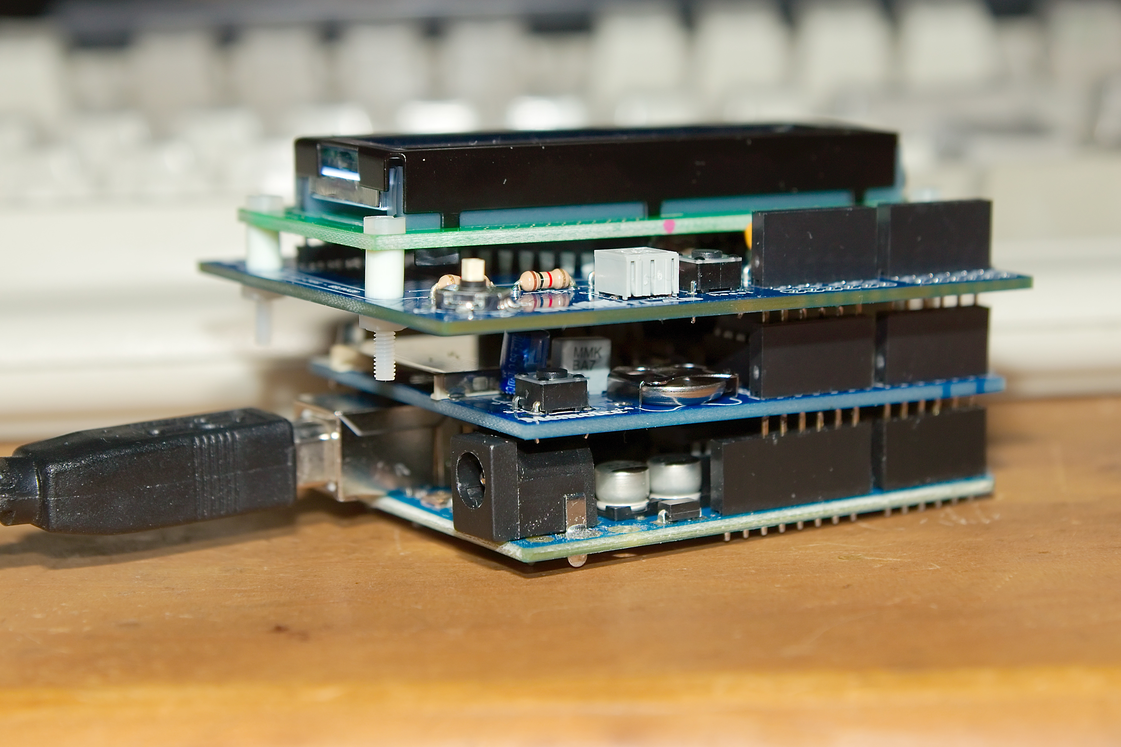 Horloge sur l’Arduino (utilisation des shields Mémoire et Deuligne de Snootlab)